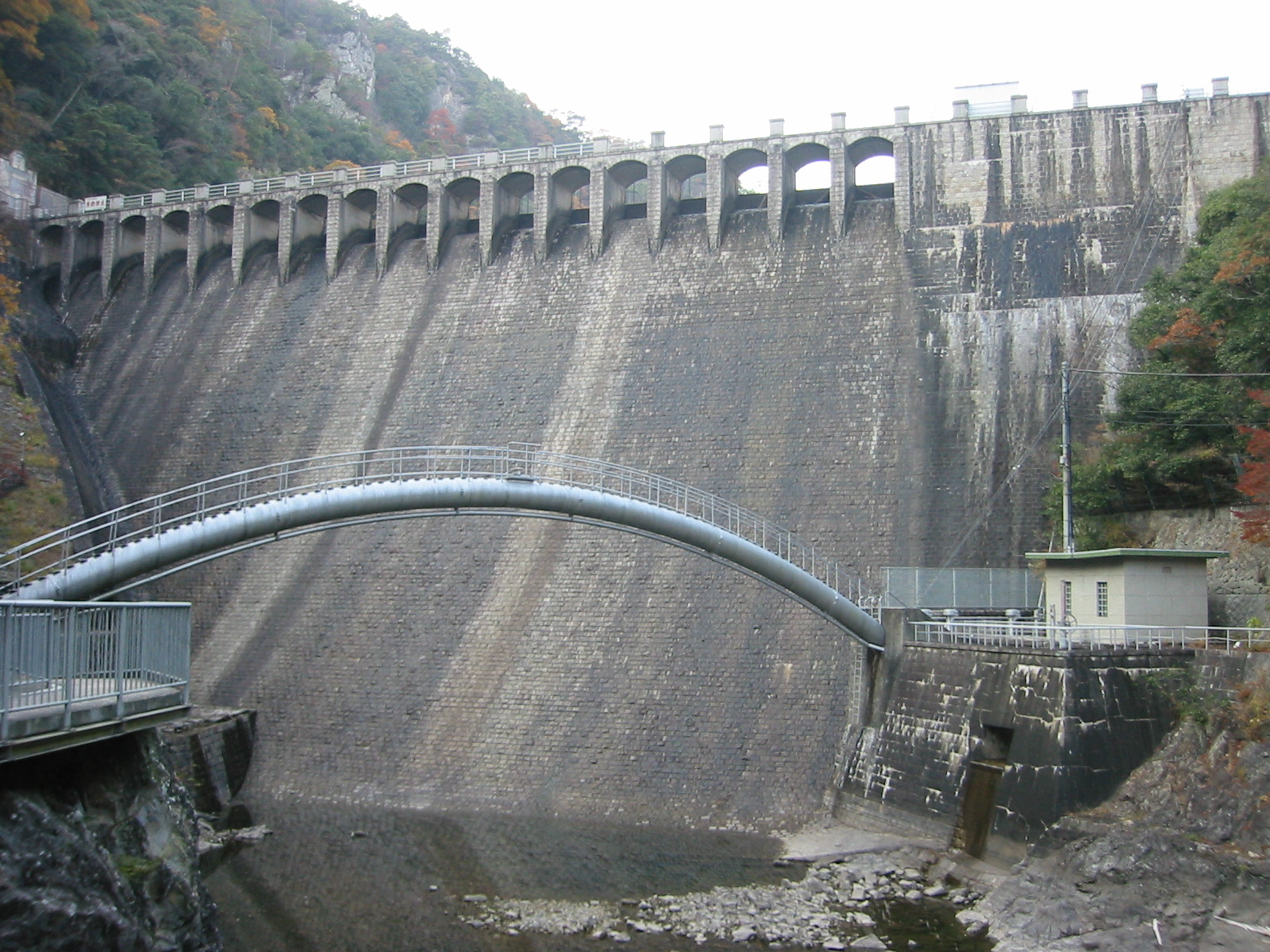 神戸 千苅貯水池